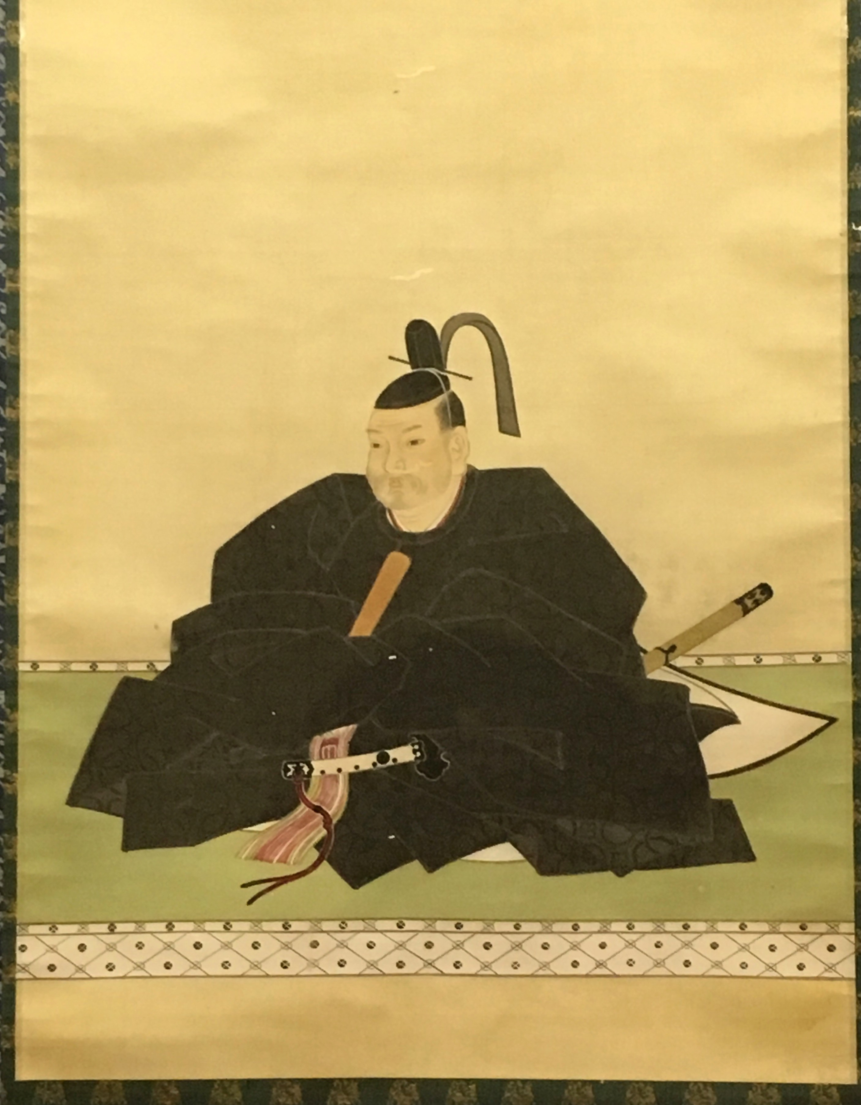 奥平昌成の肖像。